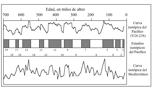 Curva de paleotemperaturas de isótopos de oxígeno 16O/18O según el sondeo oceánico del pacífico V28-238 comparada con el sondeo del mar Mediterráneo